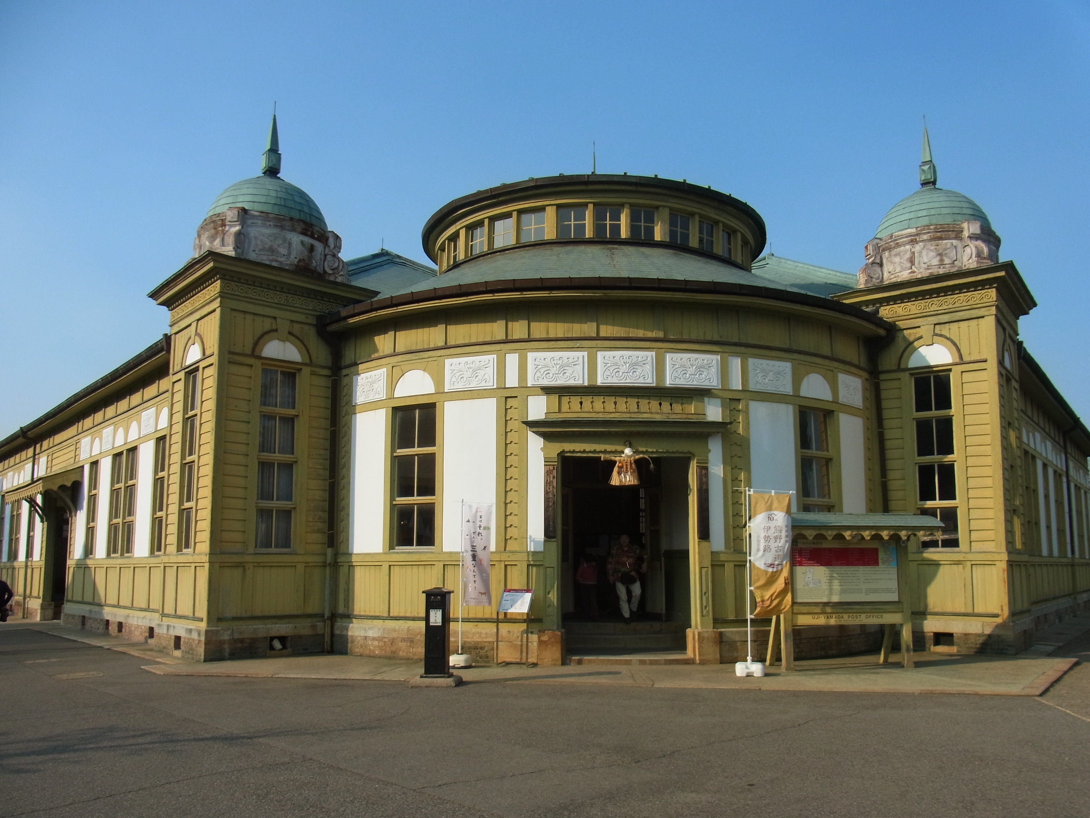 明治村、宇治山田郵便局